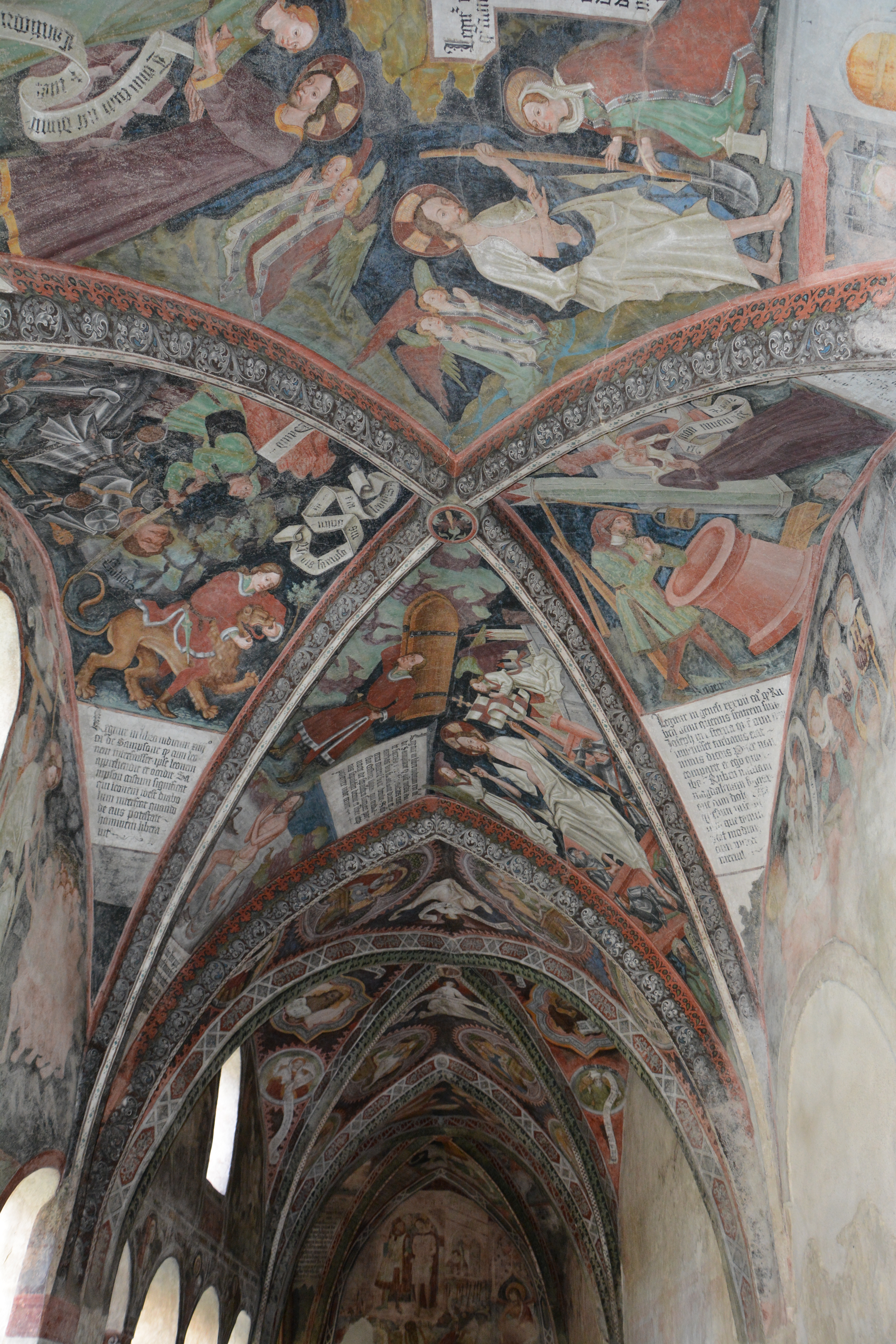 Kreuzgang des Brixner Domes, Westflügel. Im Vordergrund die 5. Arkade mit Fresken des Meisters Leonhard von Brixen, um 1472. Dahinter die Arkaden 4 und 3.